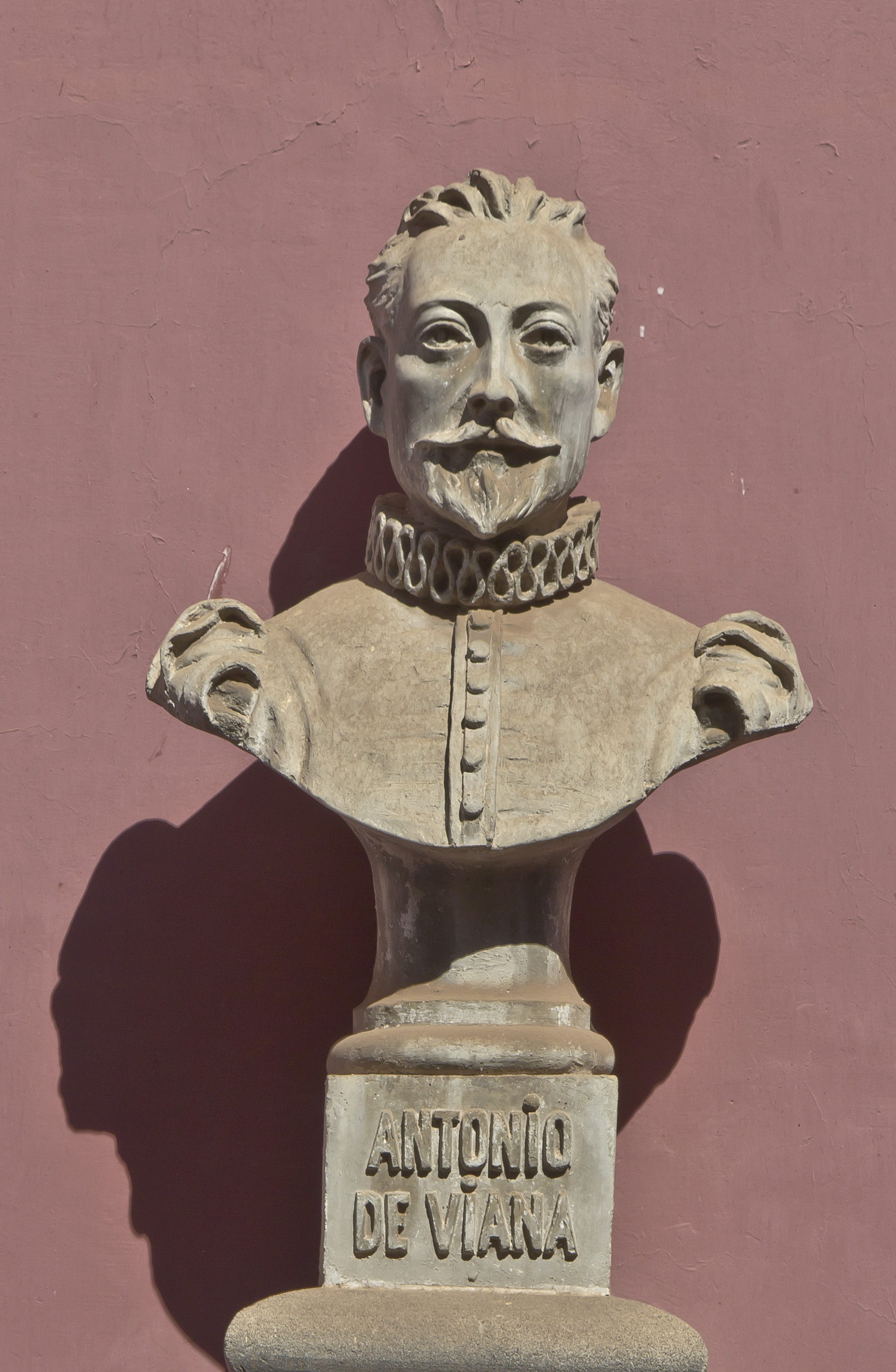 Antonio de Viana, Porträtbüste am Museo de Bellas Artes in Santa Cruz de Tenerife